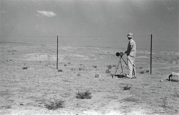 בארי - בבוקר העליה על הקרקע מבשר איש בארי את עליתם על הקרקע